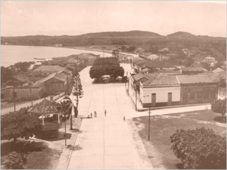 Foto datada de 1890 do centro de São pedro da Aldeia